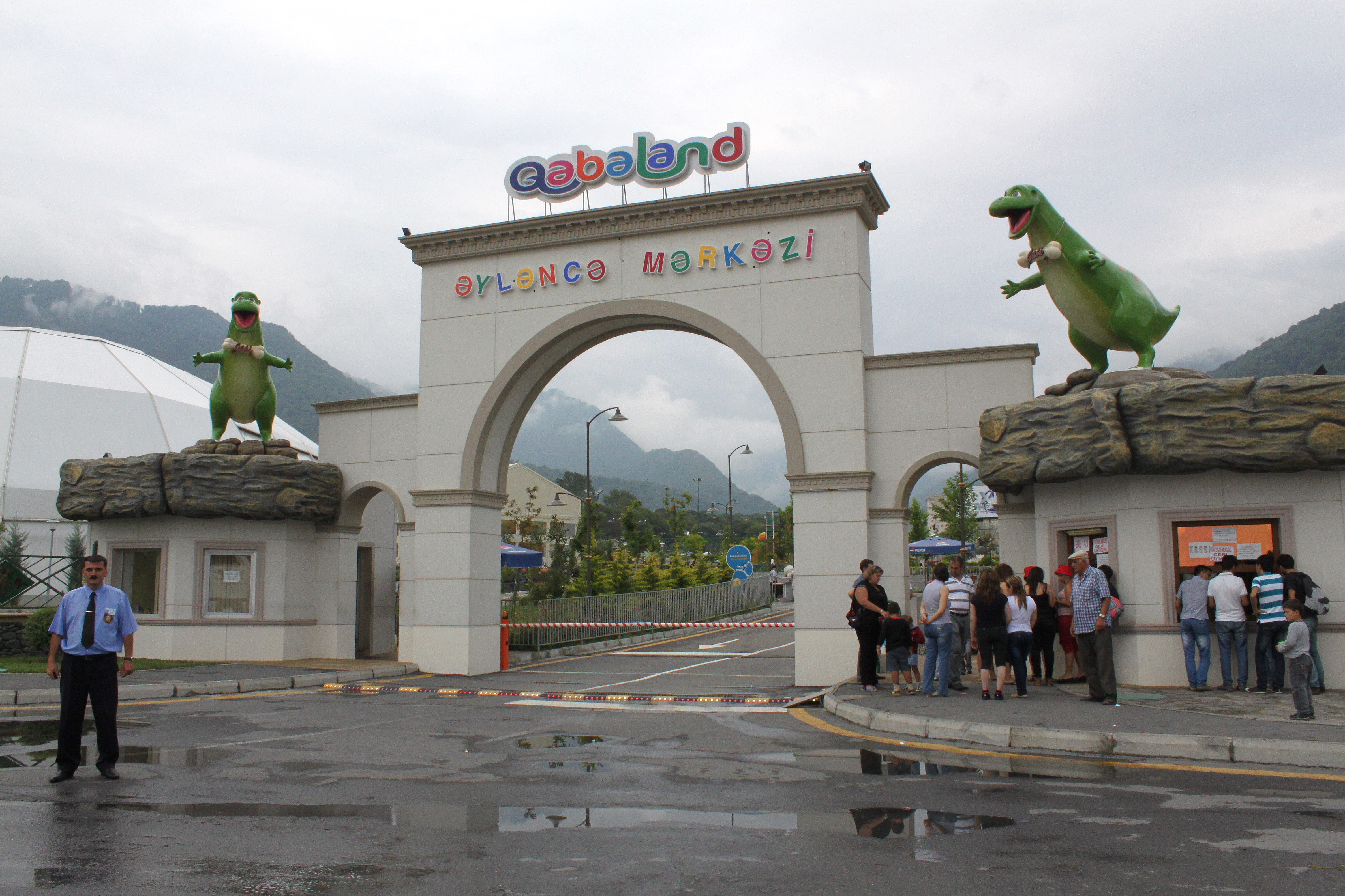 Габалинский район Азербайджана